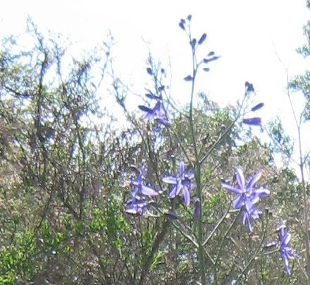 Pasithea coerulea (Ruiz et Pav.)D.Don, azulillo. Matorral Central Chile. Lo Cañas, Santiago